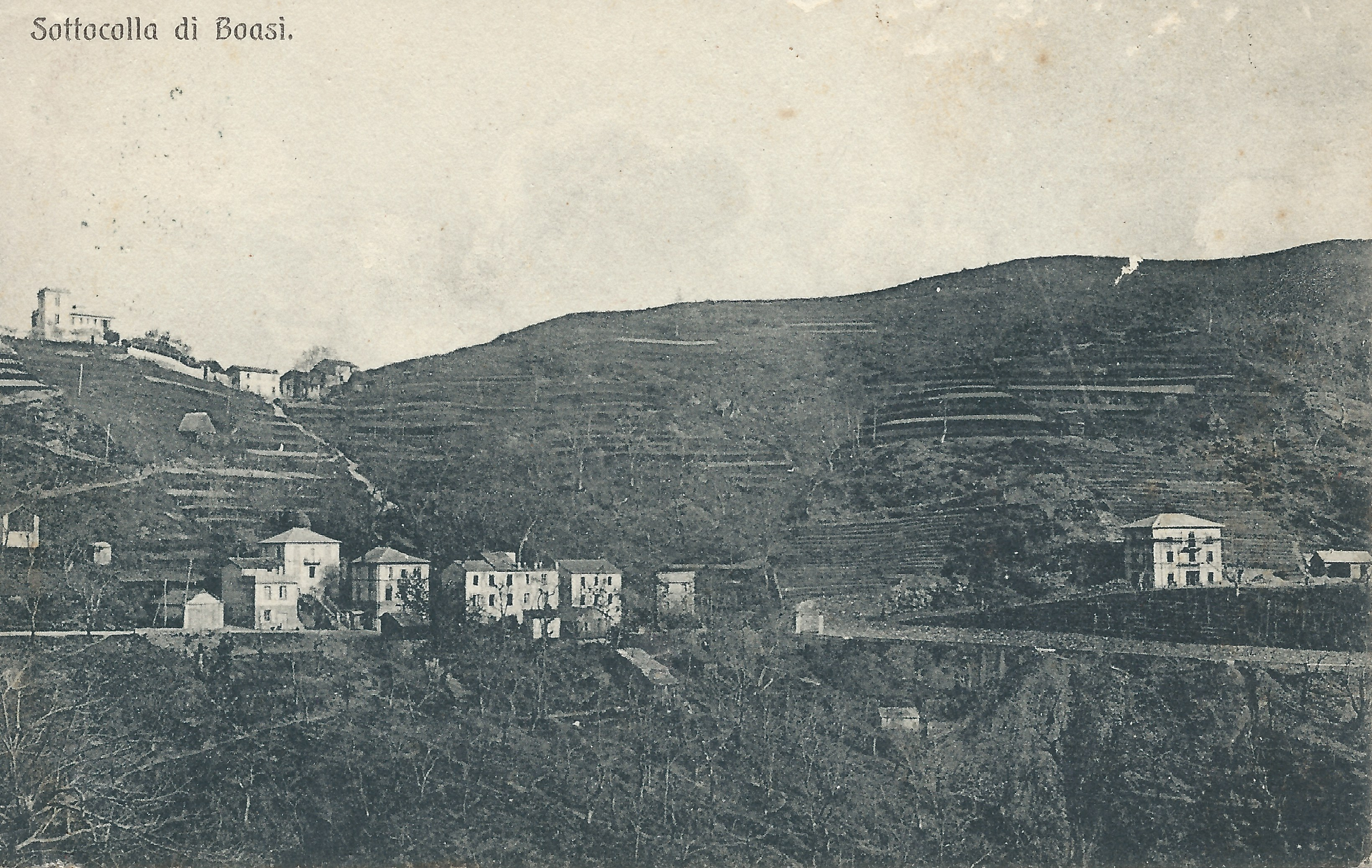 La zona di Sottocolla di Boasi nel 1922 prima della costruzione della galleria tra le valli Fontanabuona e Bisagno